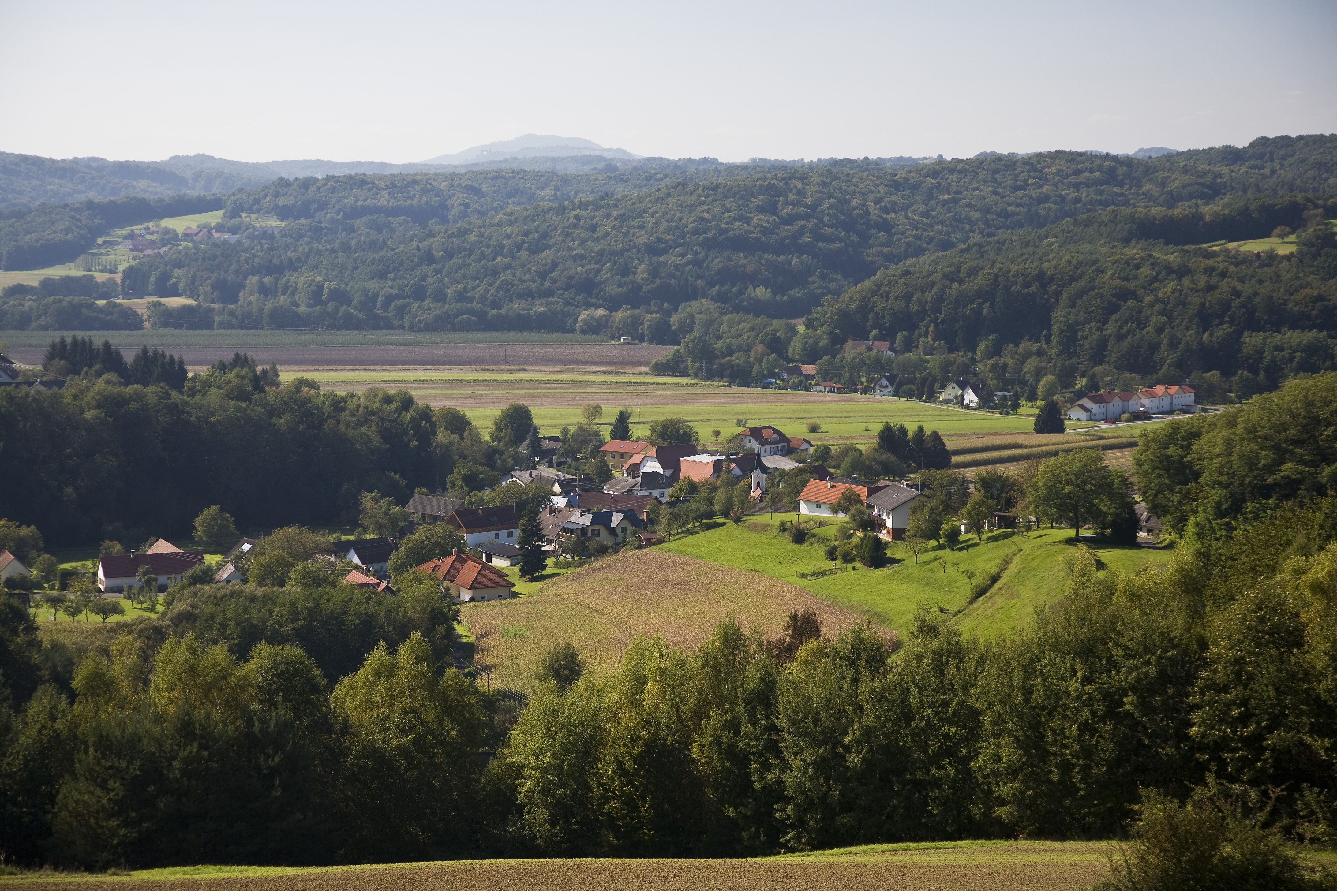 Windisch Minihof von Osten